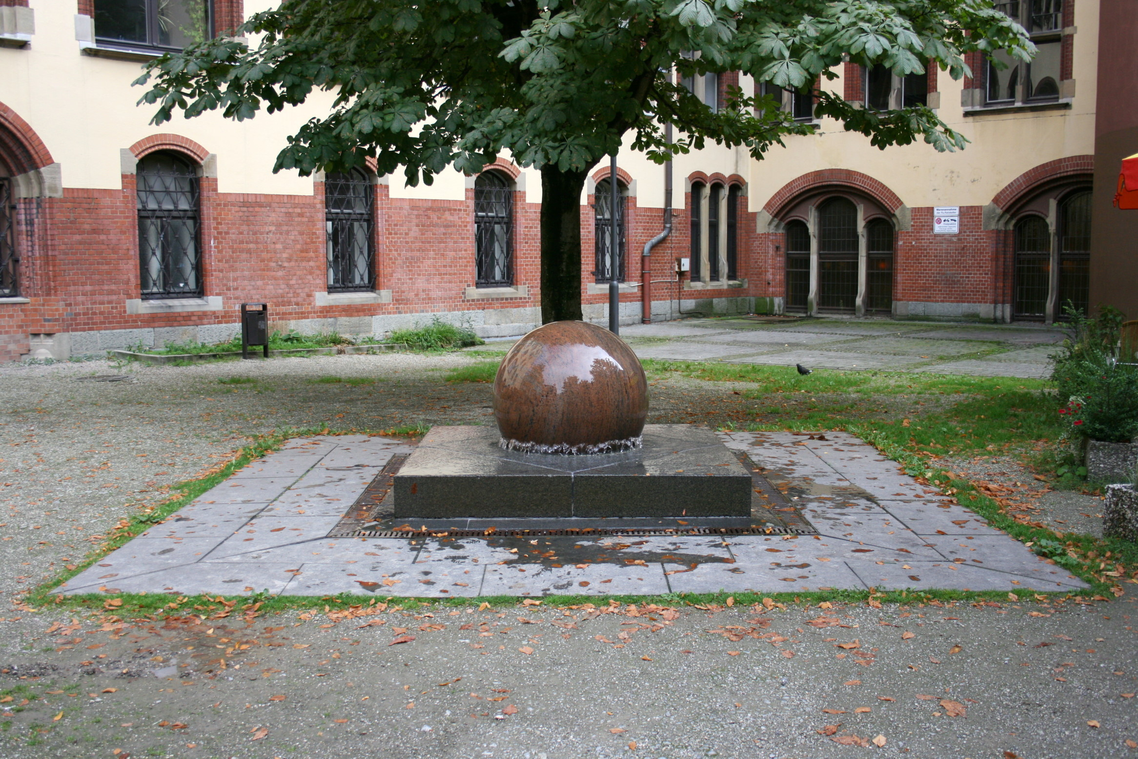 Neuer Döppersberger Brunnen auf dem Willy-Brandt-Platz in Wuppertal